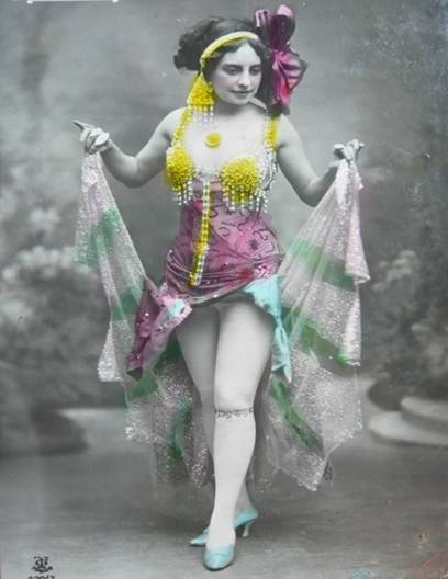 La Cupletista Consuelo Portela